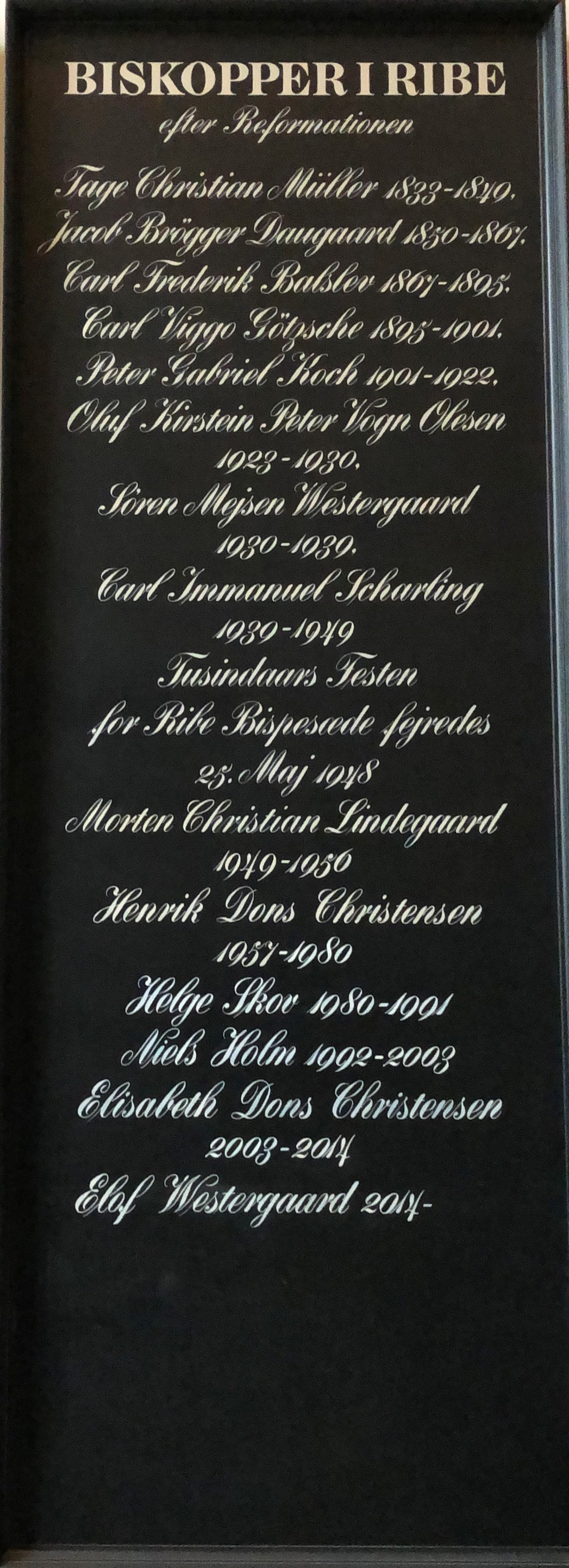 Bisperække-tavle i Ribe Domkirke over biskopper i Ribe efter Reformationen i Danmark